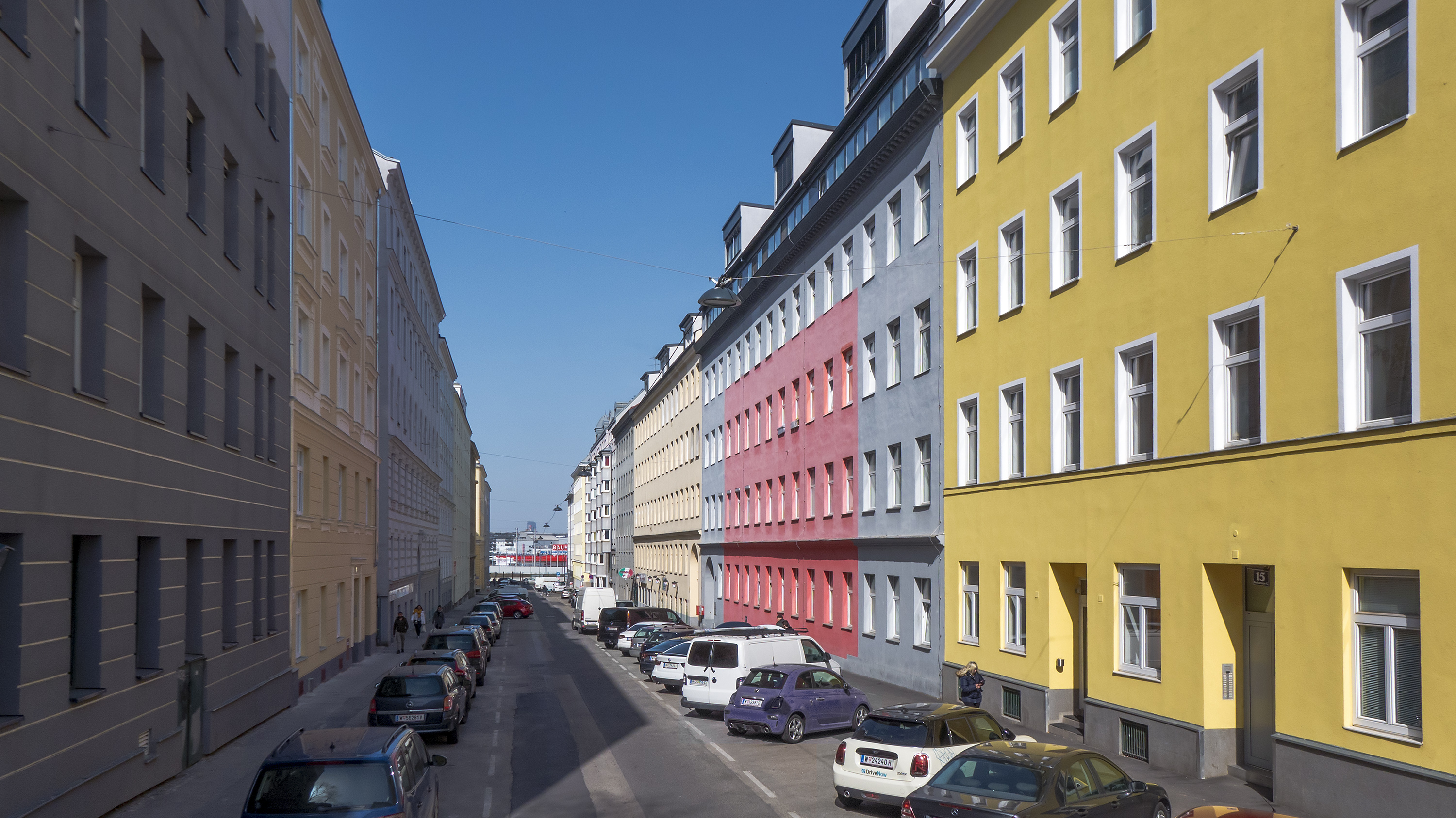 Kreta-Viertel an der Randhartingergasse 20 in Wien 10